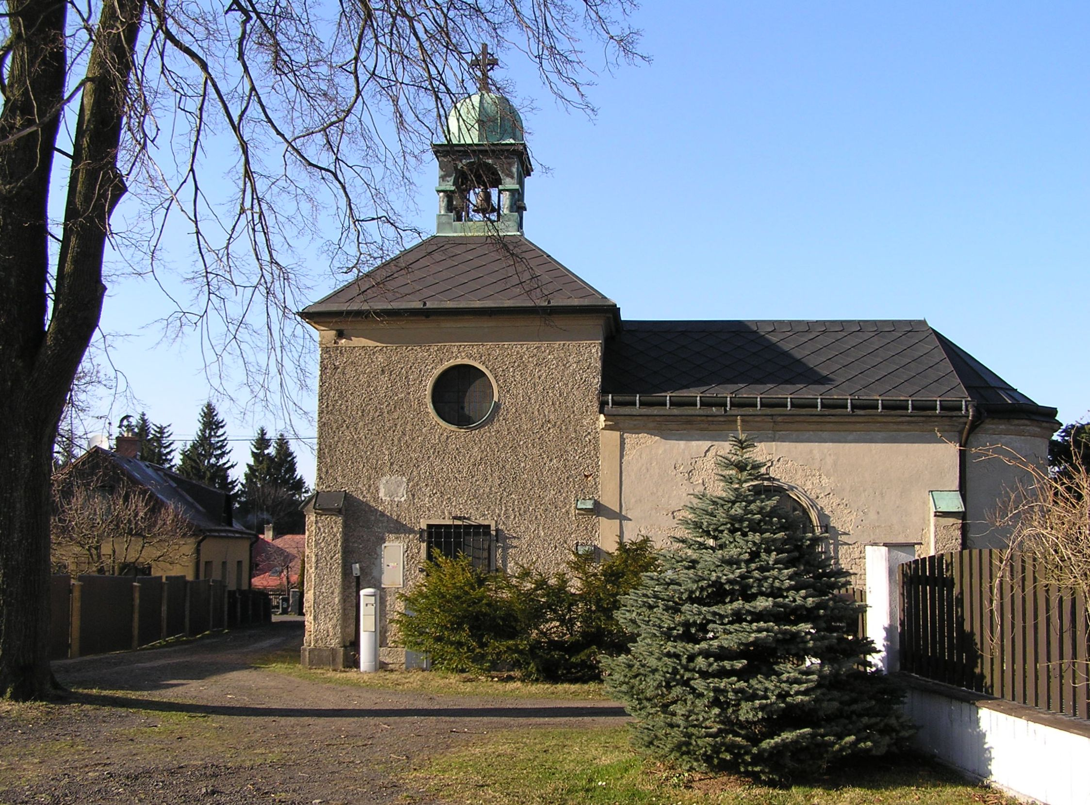 Dobrá Voda - Jablonec nad Nisou (Vrkoslavice), kaple